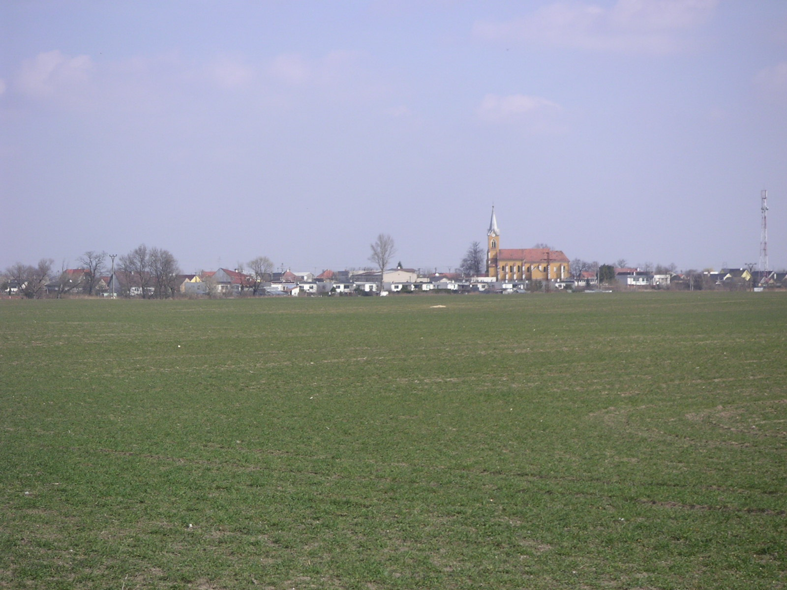 View on Jakubov, Slovakia